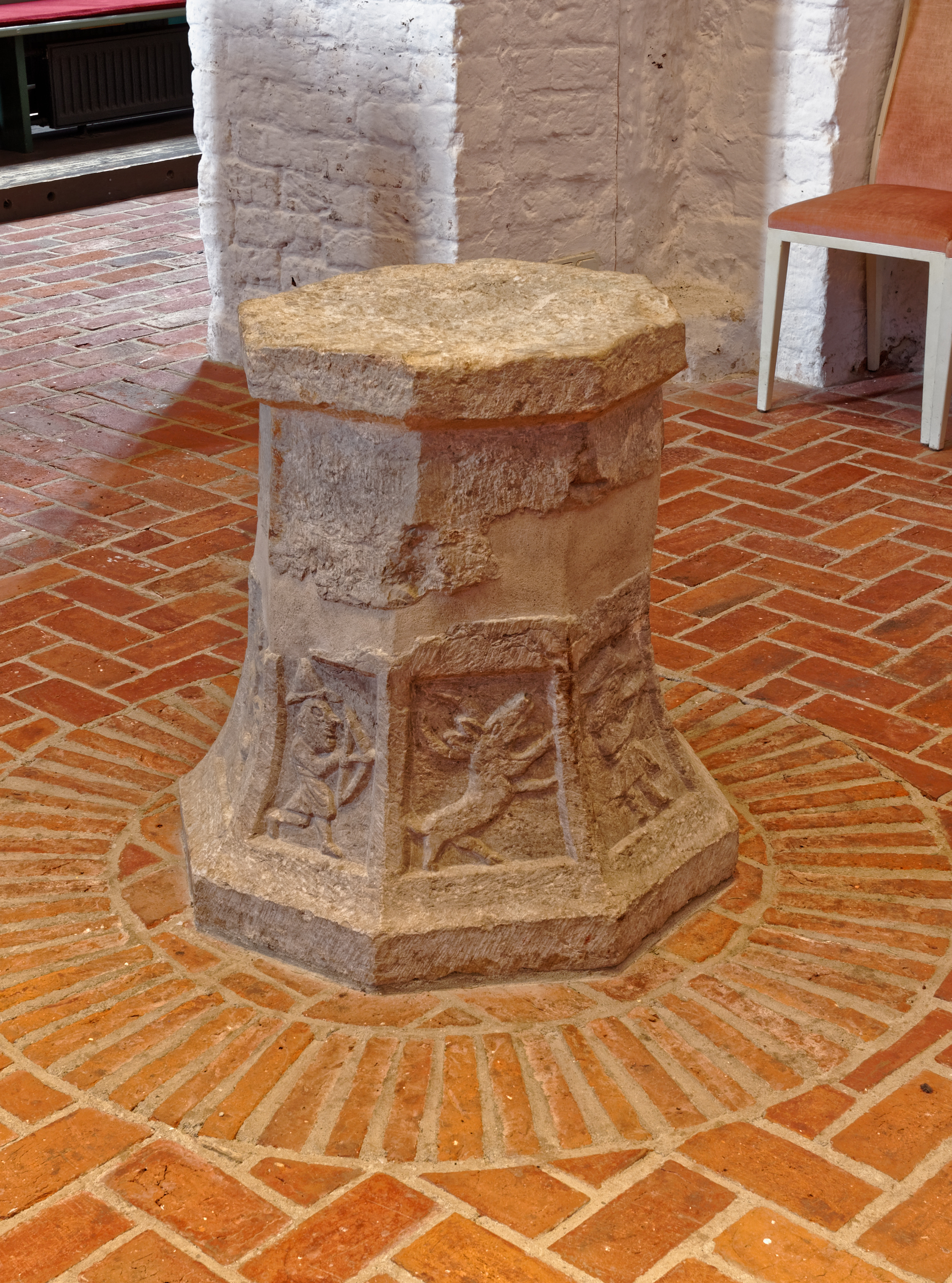 Sandesneben, Marienkirche, Taufsteinfuß